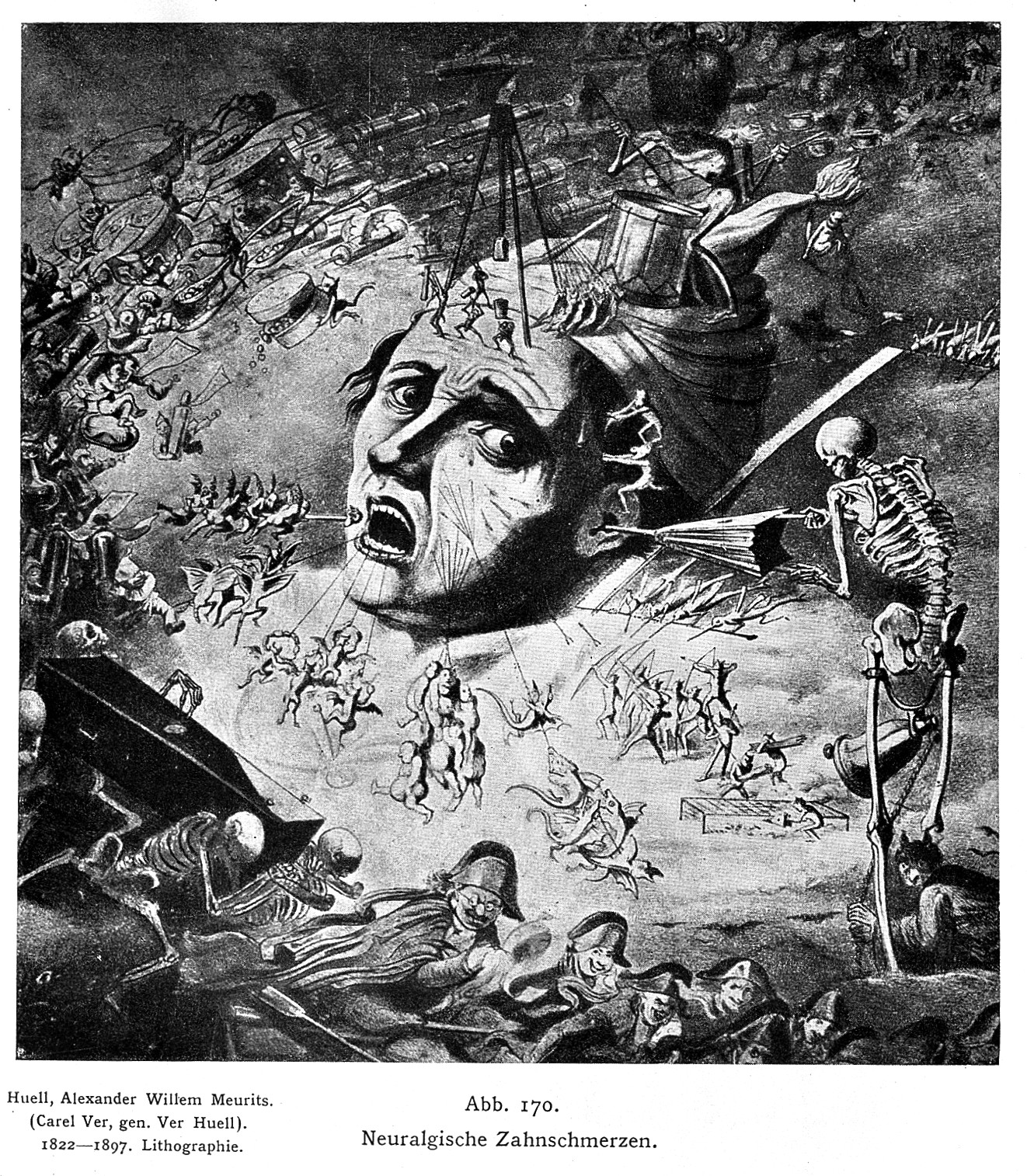 Cartoon: Neuralgische Zahnschmerzen. Toothache. General Collections Keywords: Alexander Willem Meuritis Huell